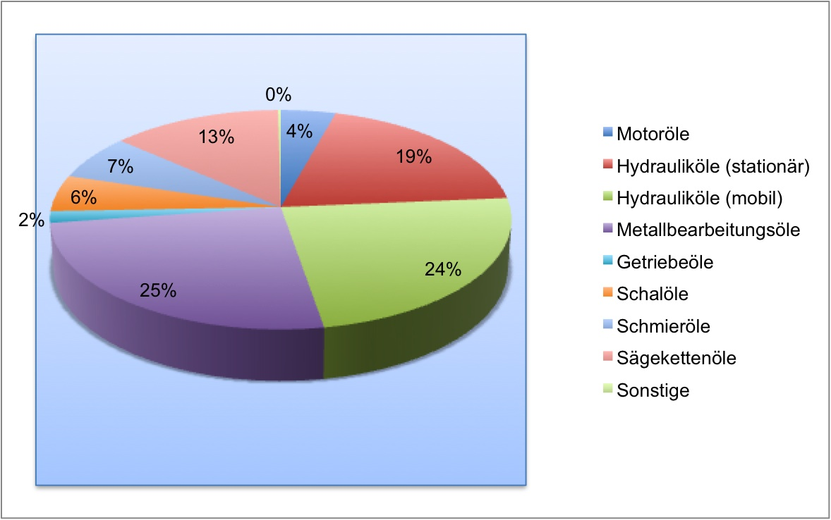 Biogene Schmiermittel: Prozentuale Anteile